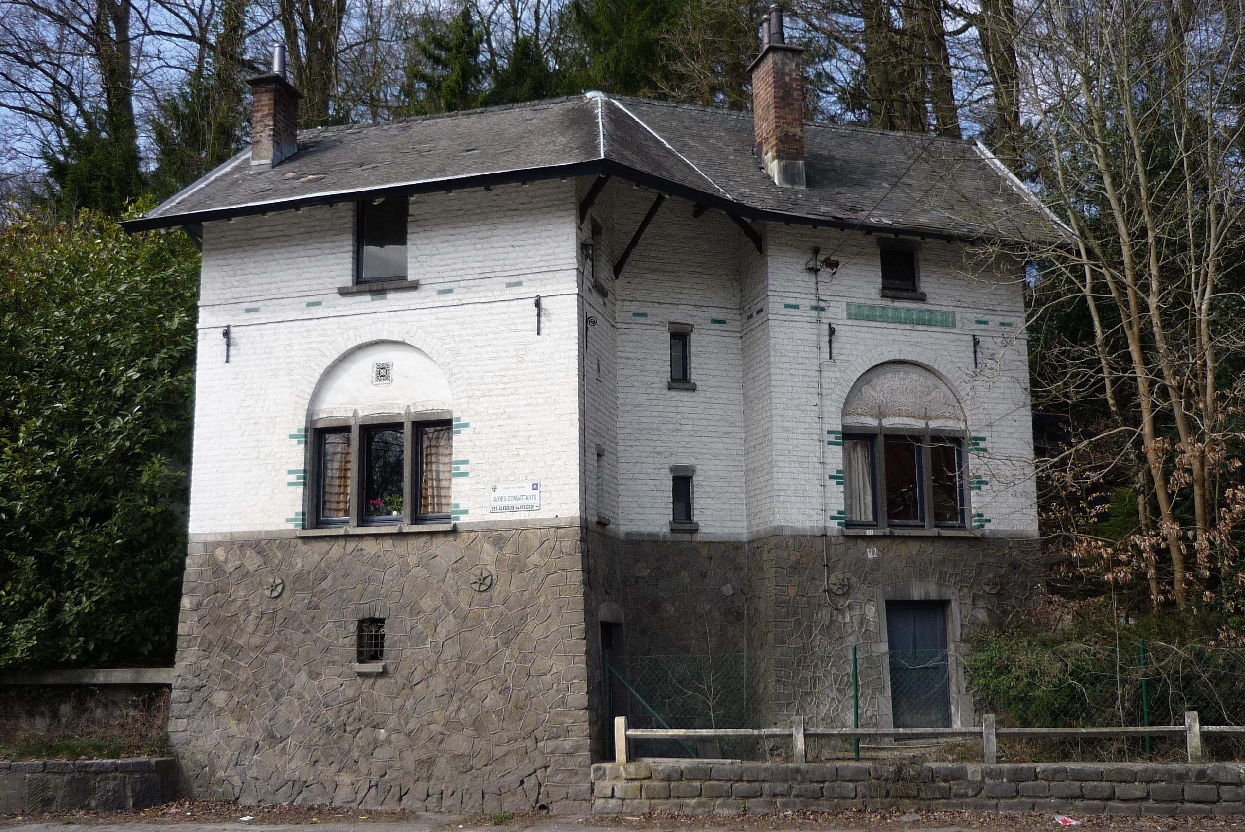 Pavillon de Concierge, avenue des Combattants, 122 à Court-Saint-Etienne, Belgique, Brabant Wallon, par l'architecte Henri van Dievoet, construit en 1895.